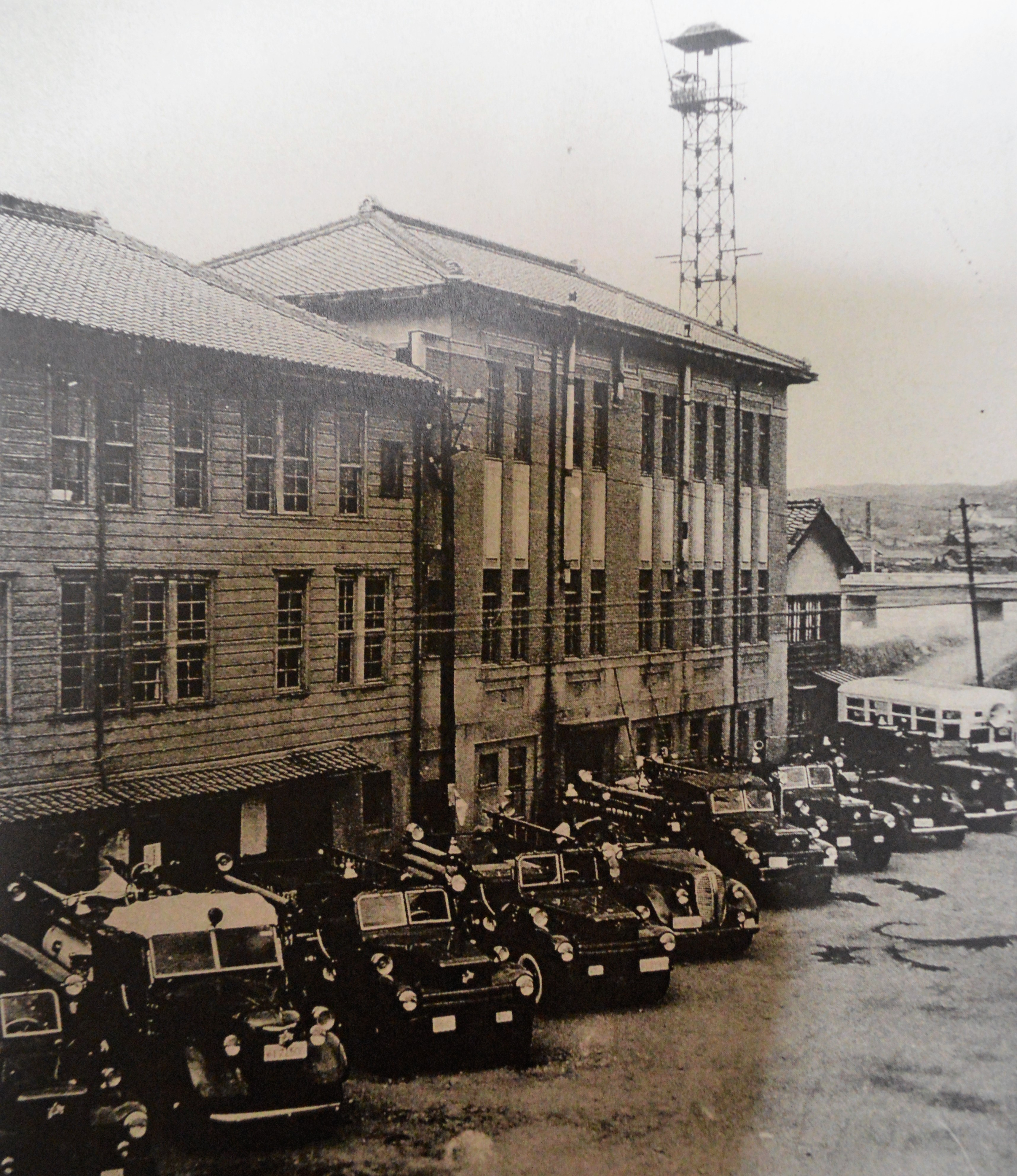 1949年に岐阜県多治見市青木町に設置された多治見消防署。1984年に三笠町に移転している。